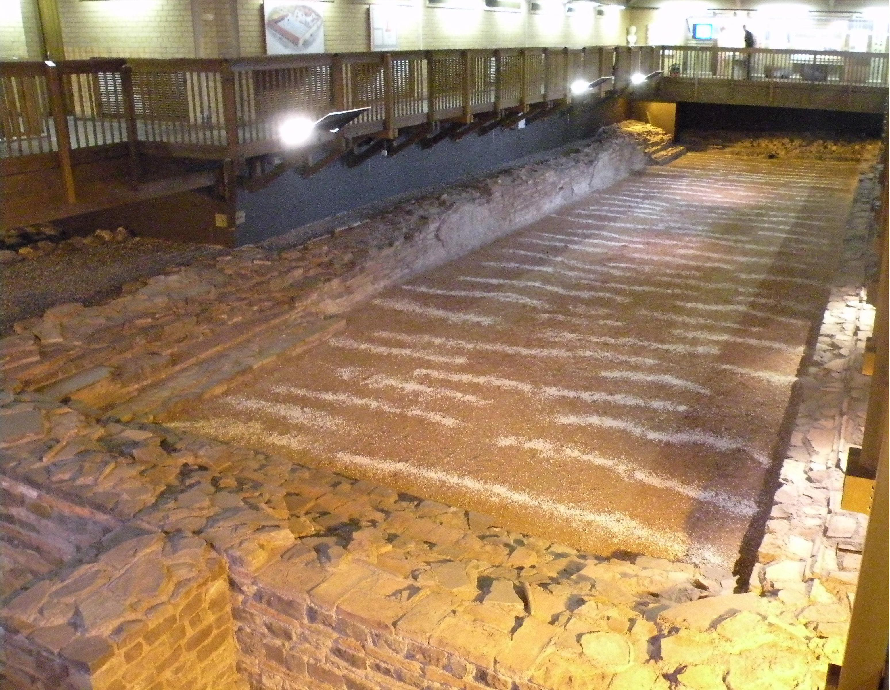 ruine des bain de caerleon, pays de galles